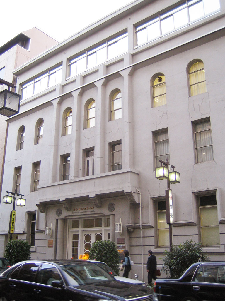 Nagoya Stock Exchange (名古屋証券取引所 Nagoya Shōken Torihikijo ), Nagoya, Aichi, Japan